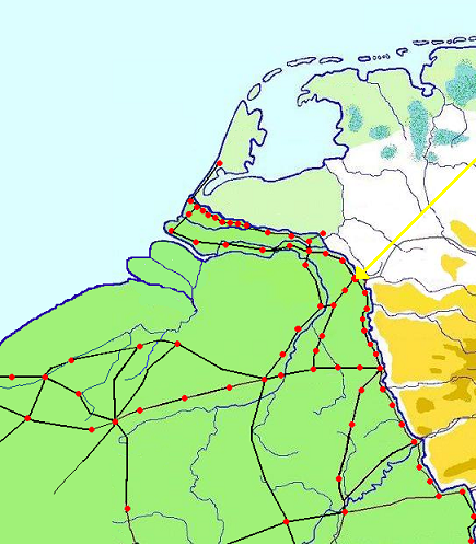 Aangepaste tekening van de Nederlanden in de Romeinse tijd, vereenvoudigde versie met wegen en nederzettingen